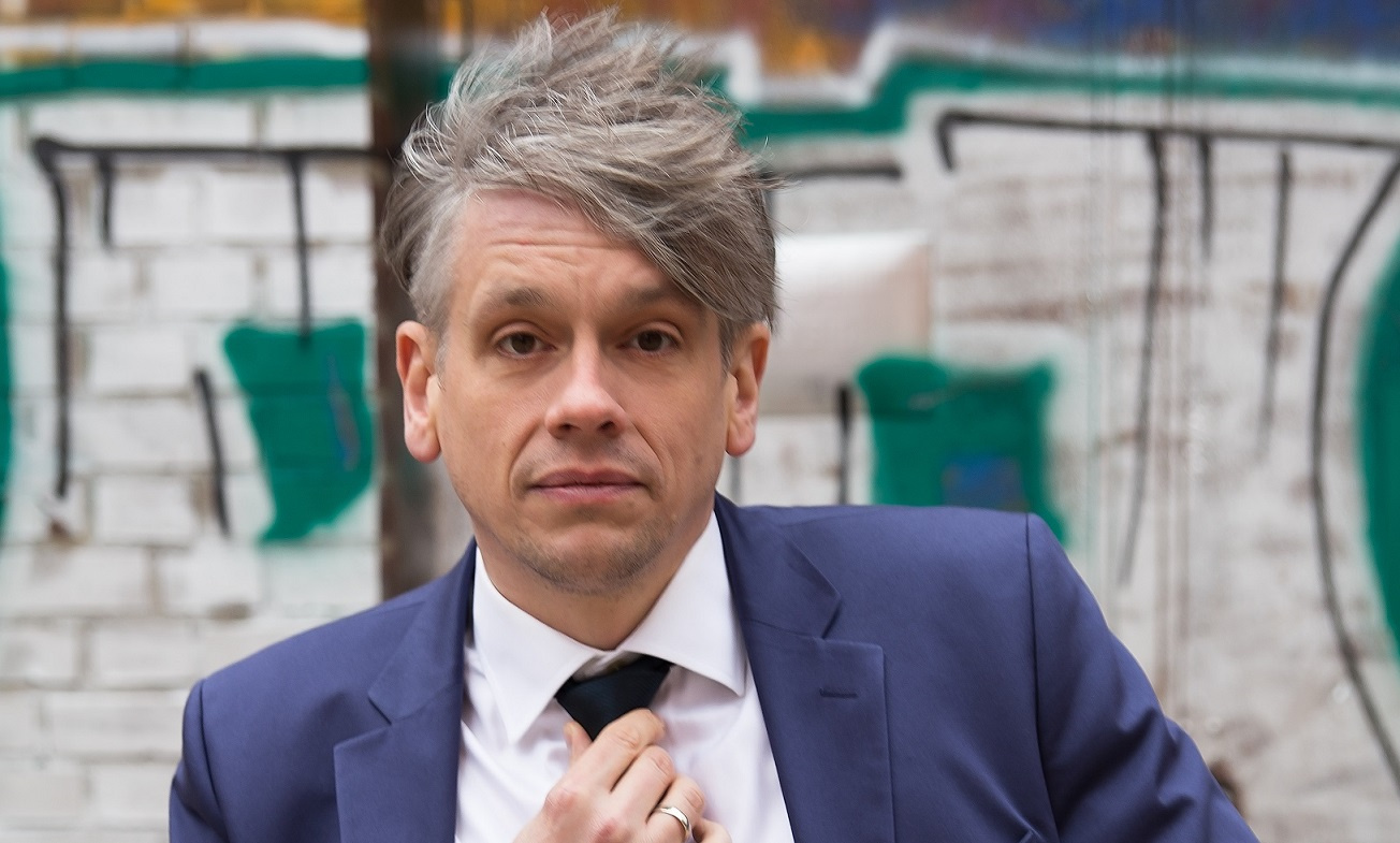 Offizielles Pressefoto 2015